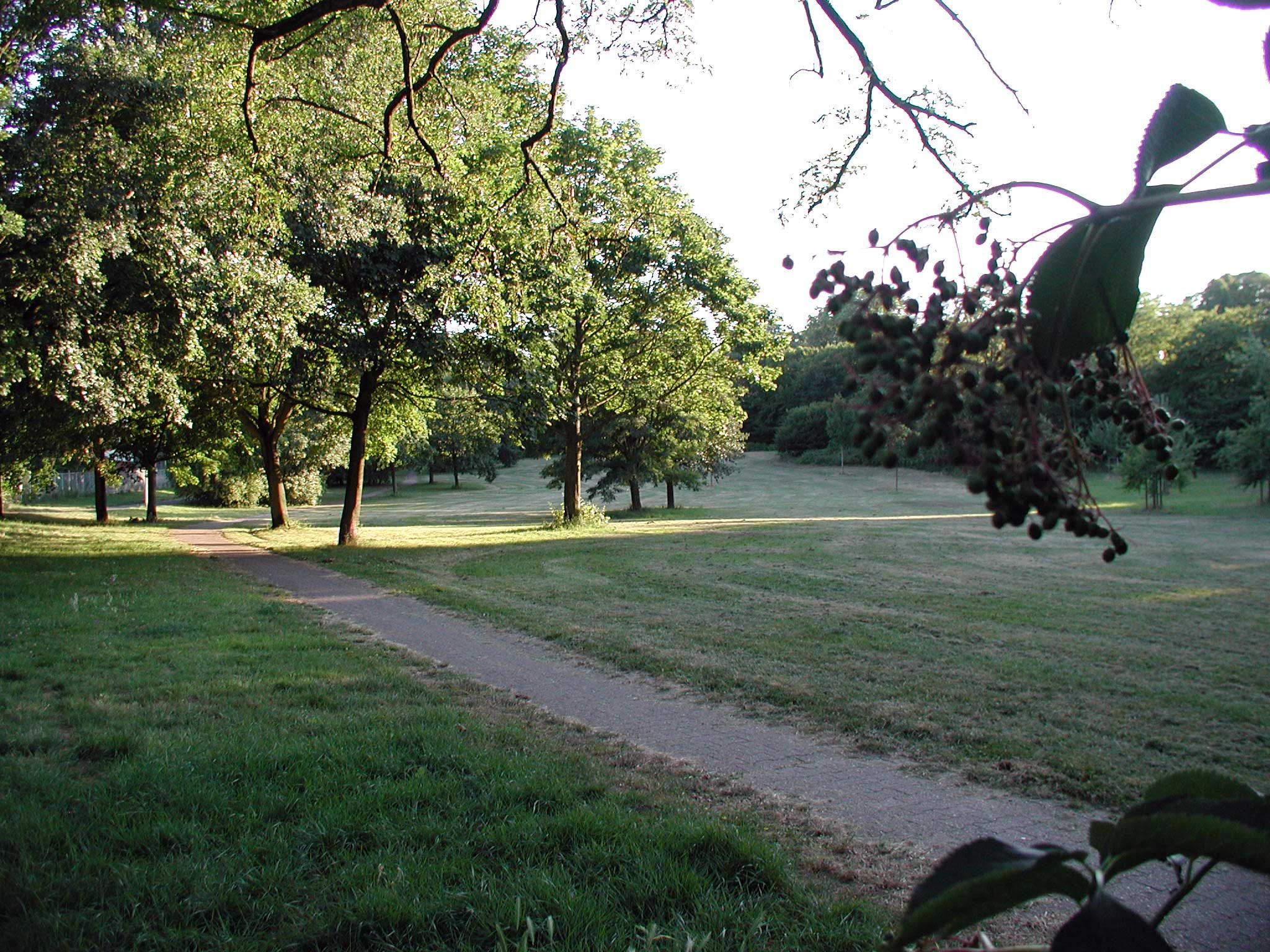 Grüngürtel-Köln-Vorgebirgspark